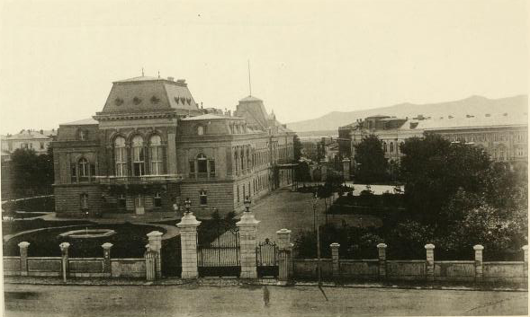 Imagen del palacio real en Sofía antes de 1888.